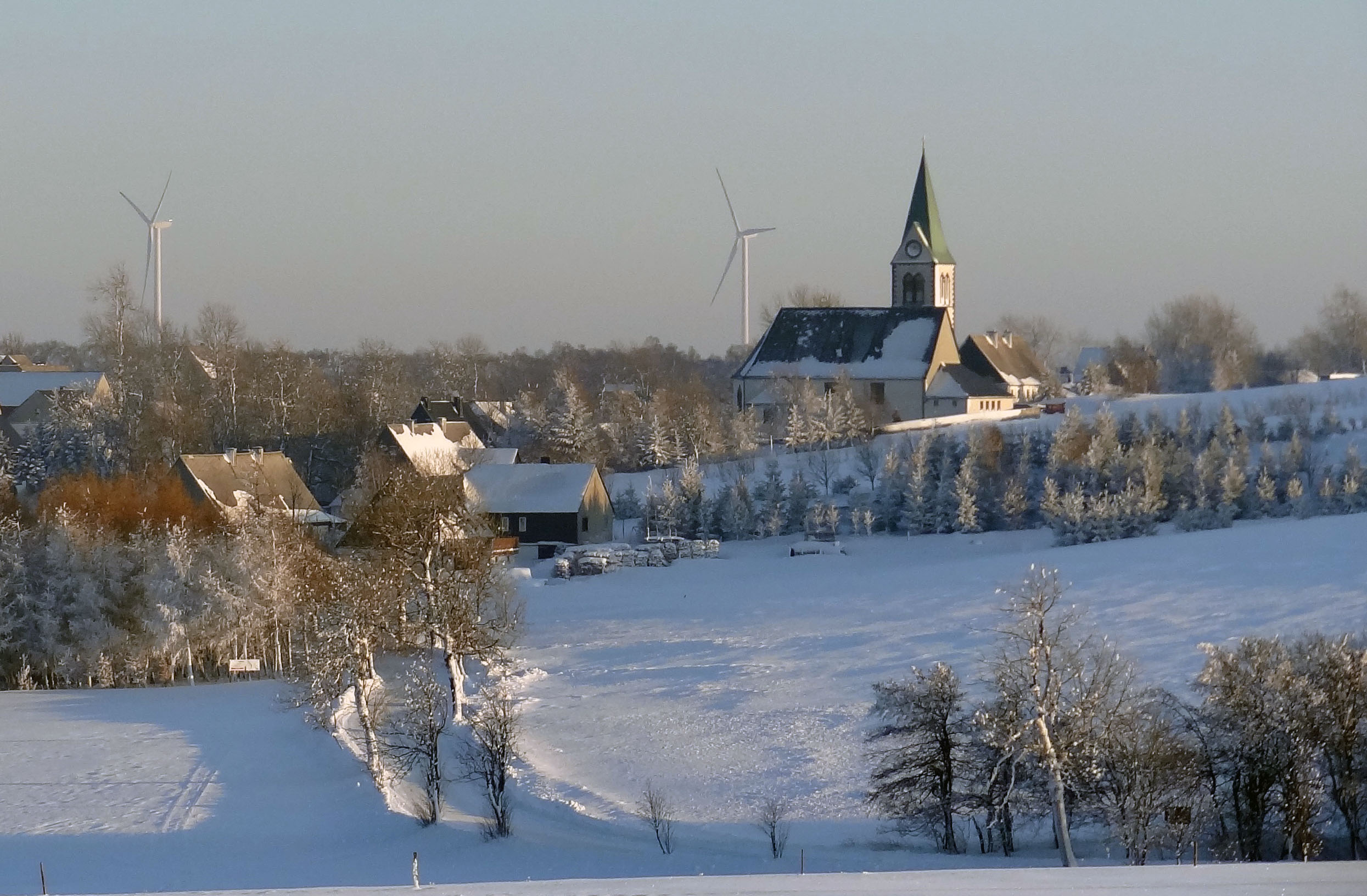 Kirche in Fürstenau im Winter mit Windrädern 2012